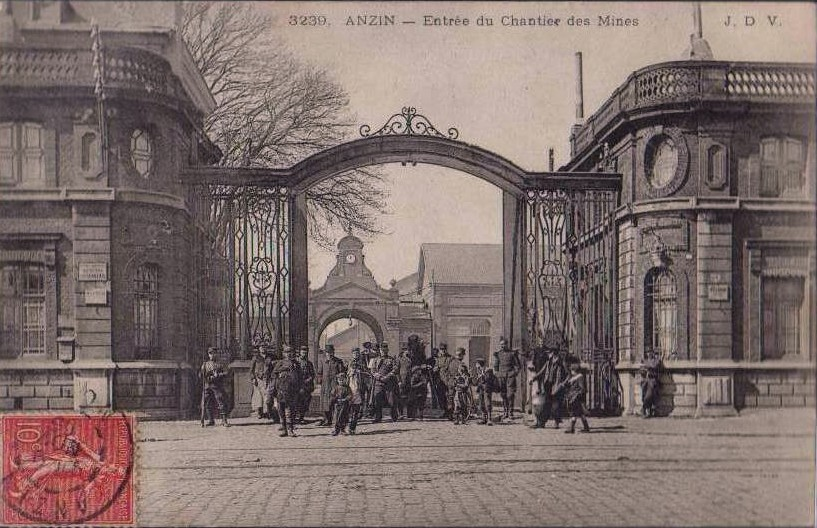 Porte d'Entrée du chantier des Mines d'Anzin au début du 20ème siècle